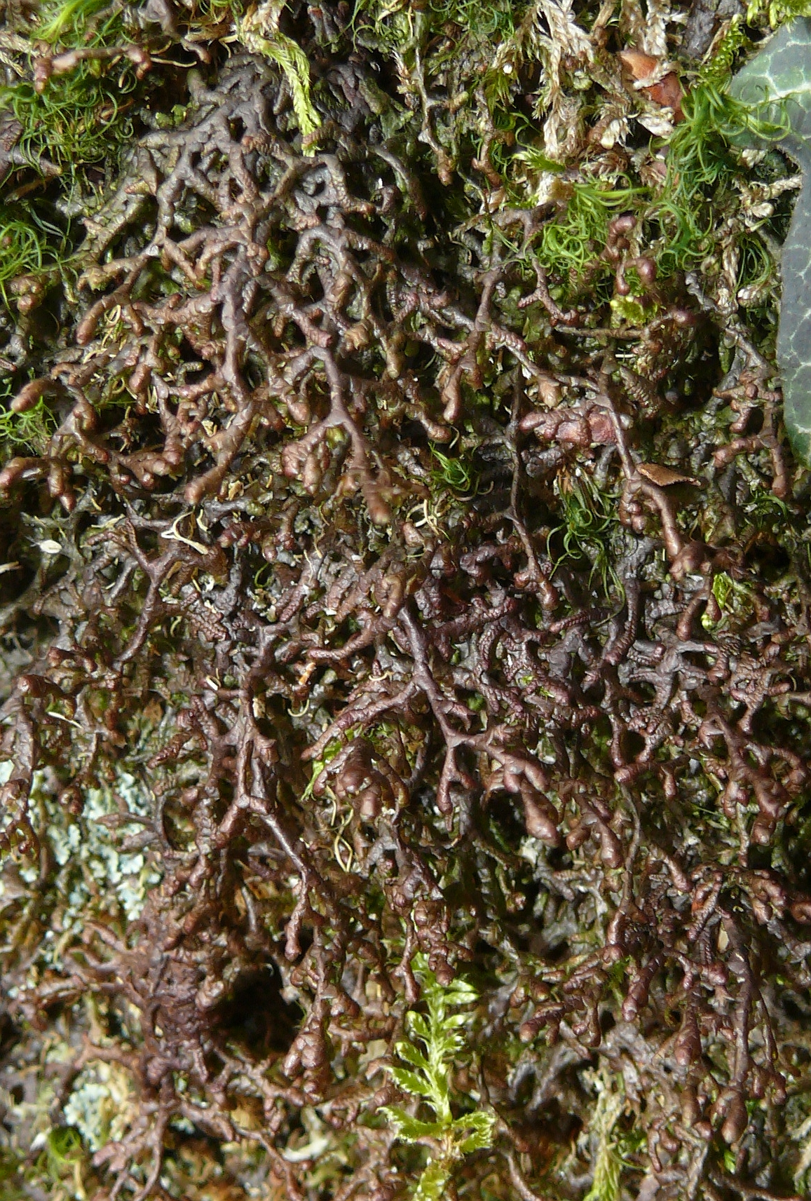 Frullania tamarisci, Schwäbisch-Fränkische Waldberge, Germany